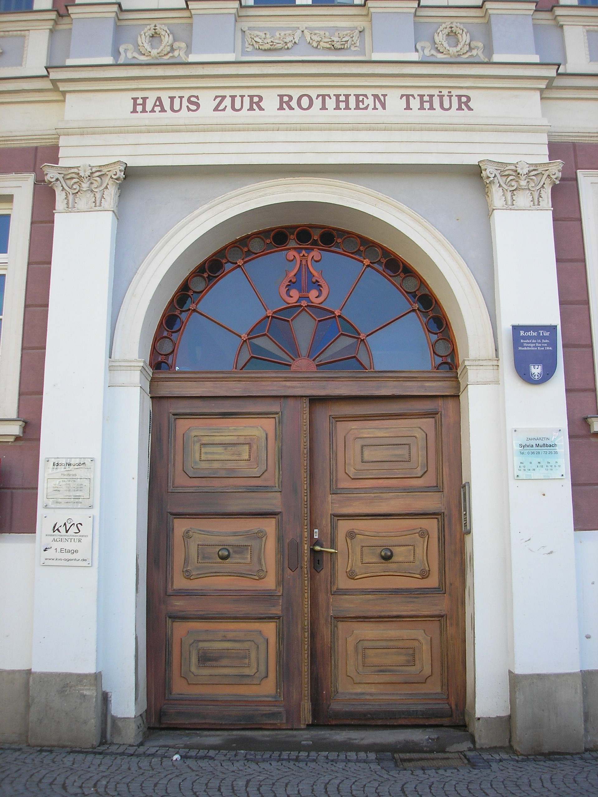 Das Portal des Hauses zur rothen Thür in Arnstadt (Thüringen).